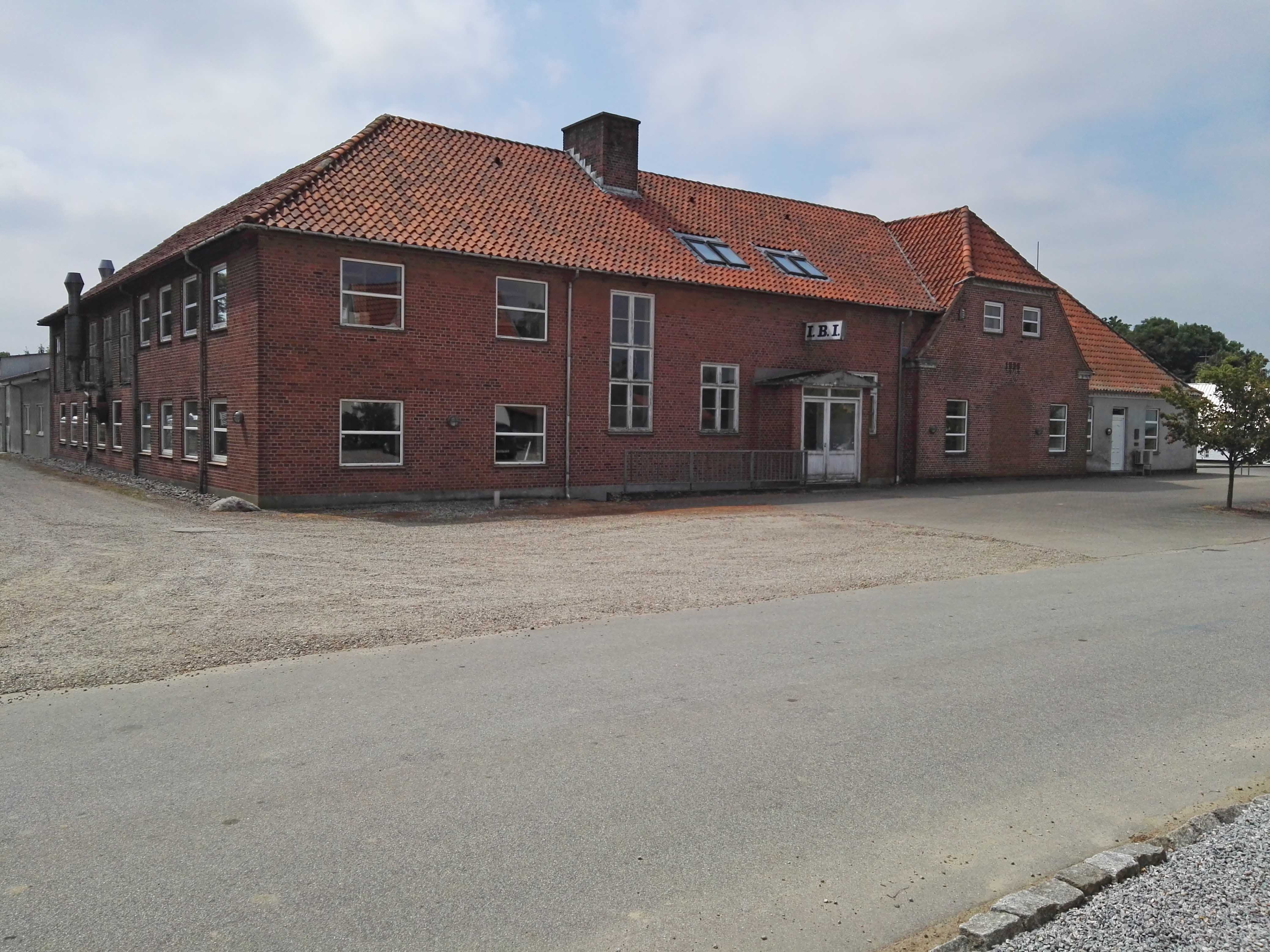 Strandelhjørns tidligere skole, der nu huser IBI-International Bag Industry A/S